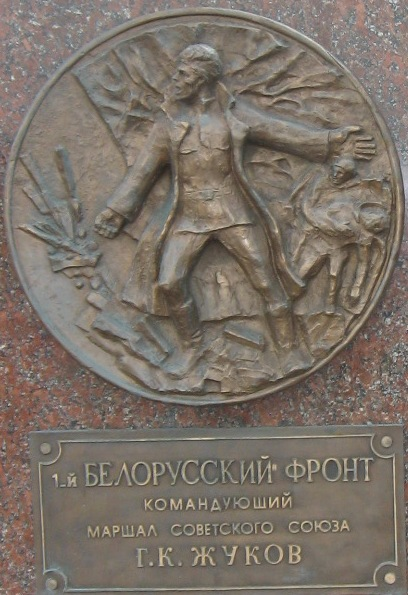 Pomnik upamiętniający 1 Front Białoruski w Muzeum Wojny Ojczyźnianej w Moskwie